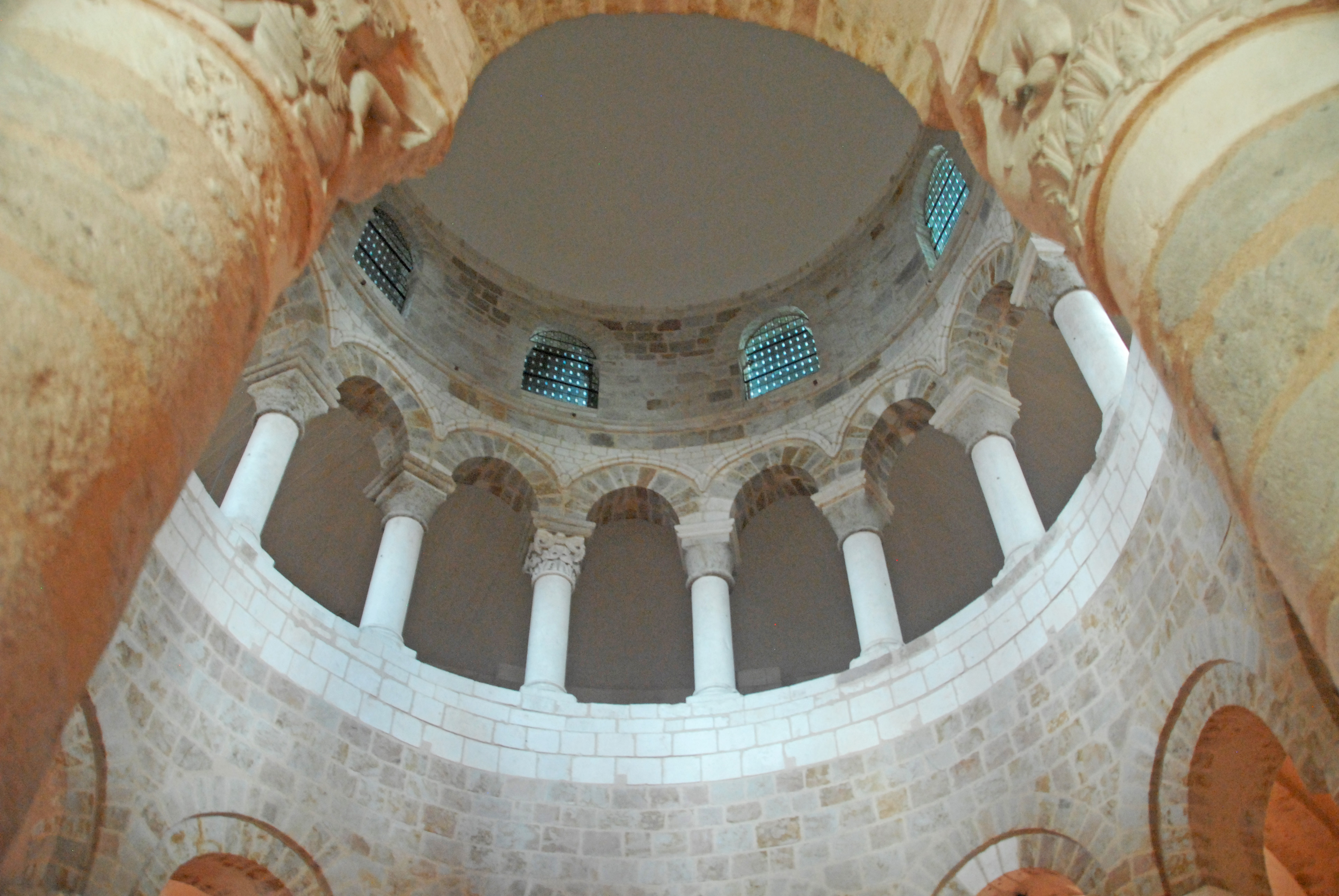 Neuvy_St.-Sépulcre, Rotunde, Tribüne u. Laterne